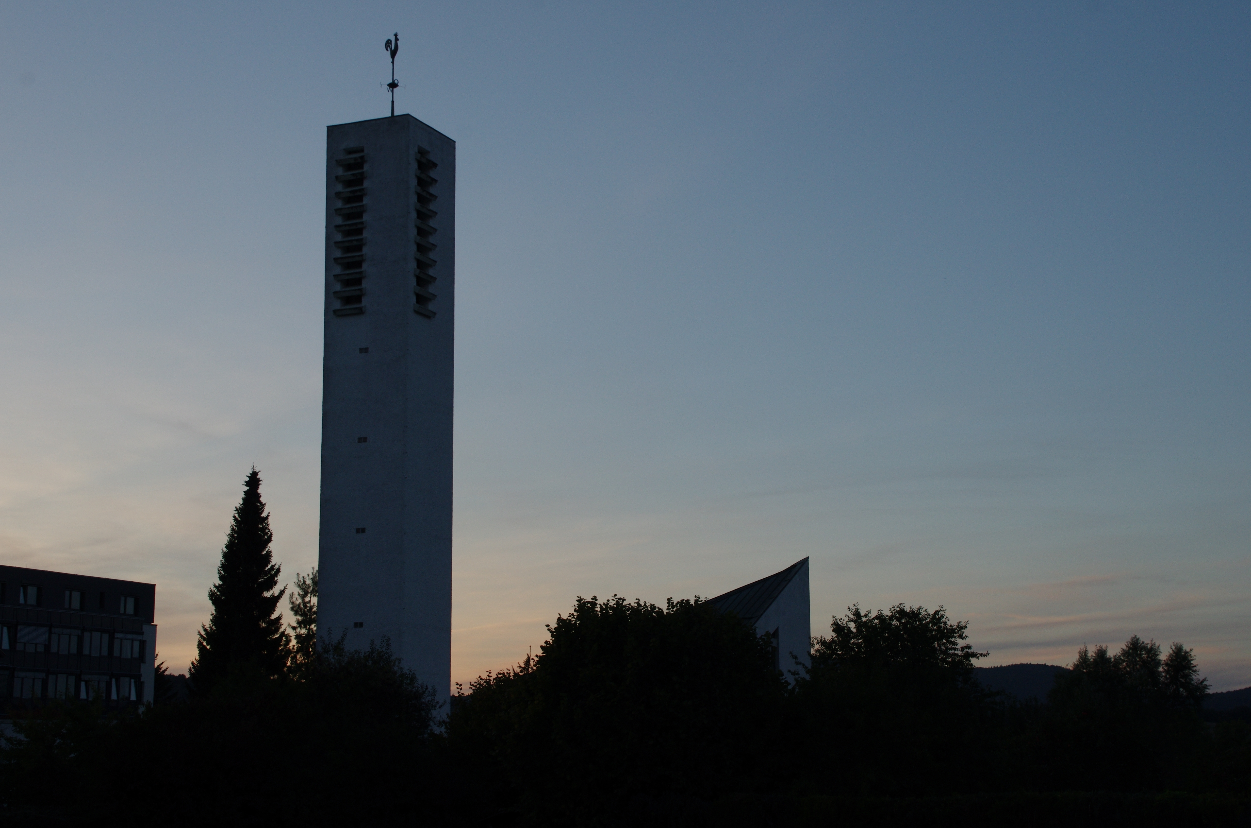 Bad Wildungen in Hesen. Die Christkönigkirche im Ortsteil Reinhardtshausen.